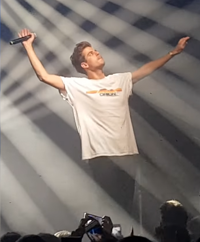 Taco Hemingway podczas występu we Wrocławiu, 2017